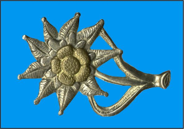 WZÓR GRAFICZNY PROPORCZYKA NA BERET 21. BATALIONU DOWODZENIA im. gen. bryg. Zygmunta Szyszko-Bohusza